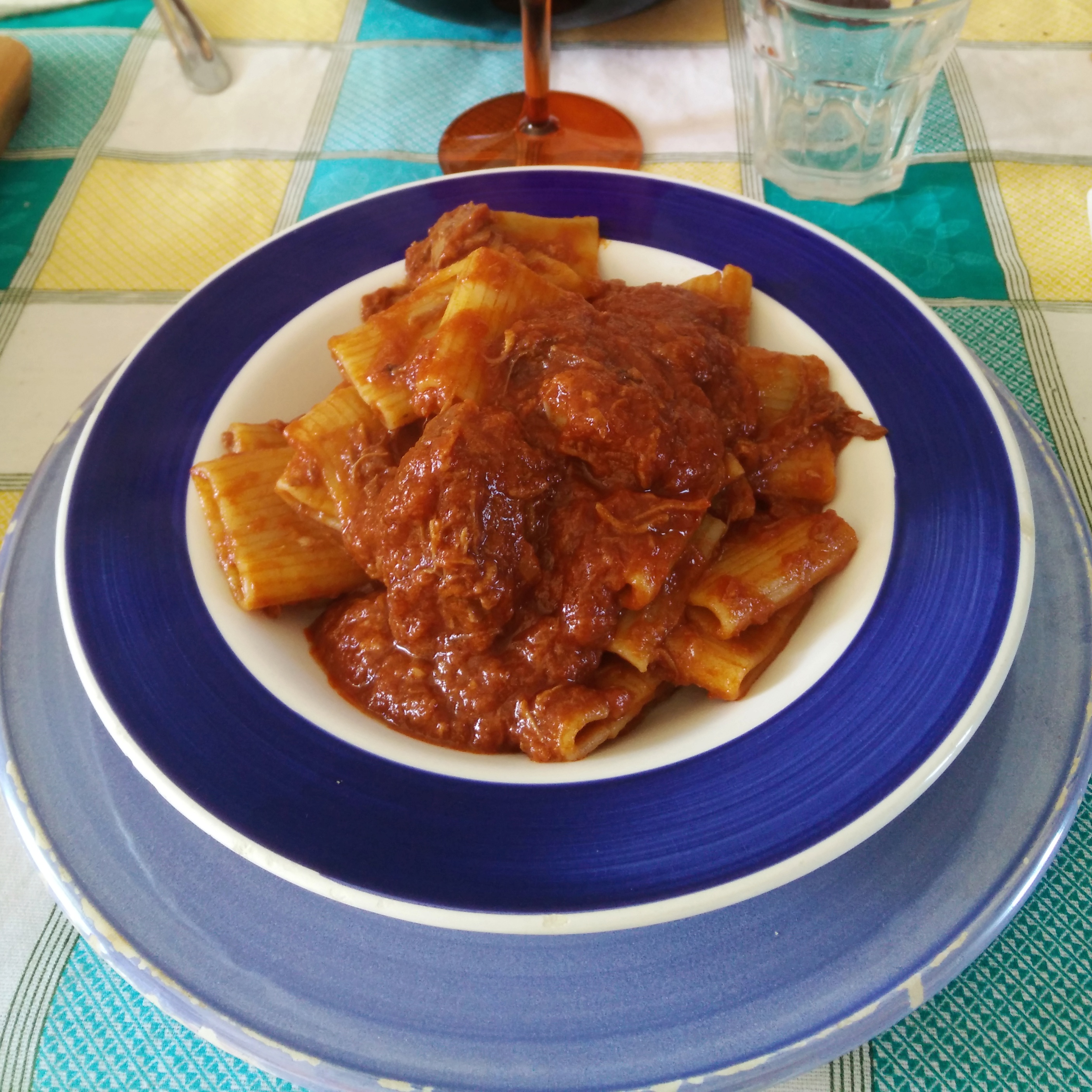 Paccheri rigati al ragù Napoletano